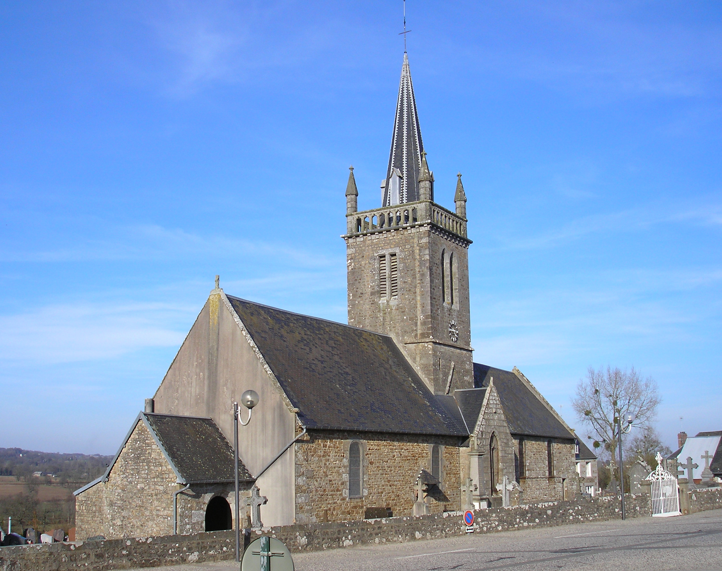 Sainte-Cécile (Normandie, France). L'église Sainte-Cécile.